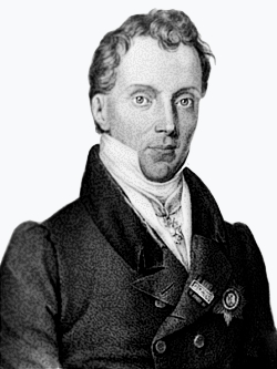 Генрих Антонович Струве